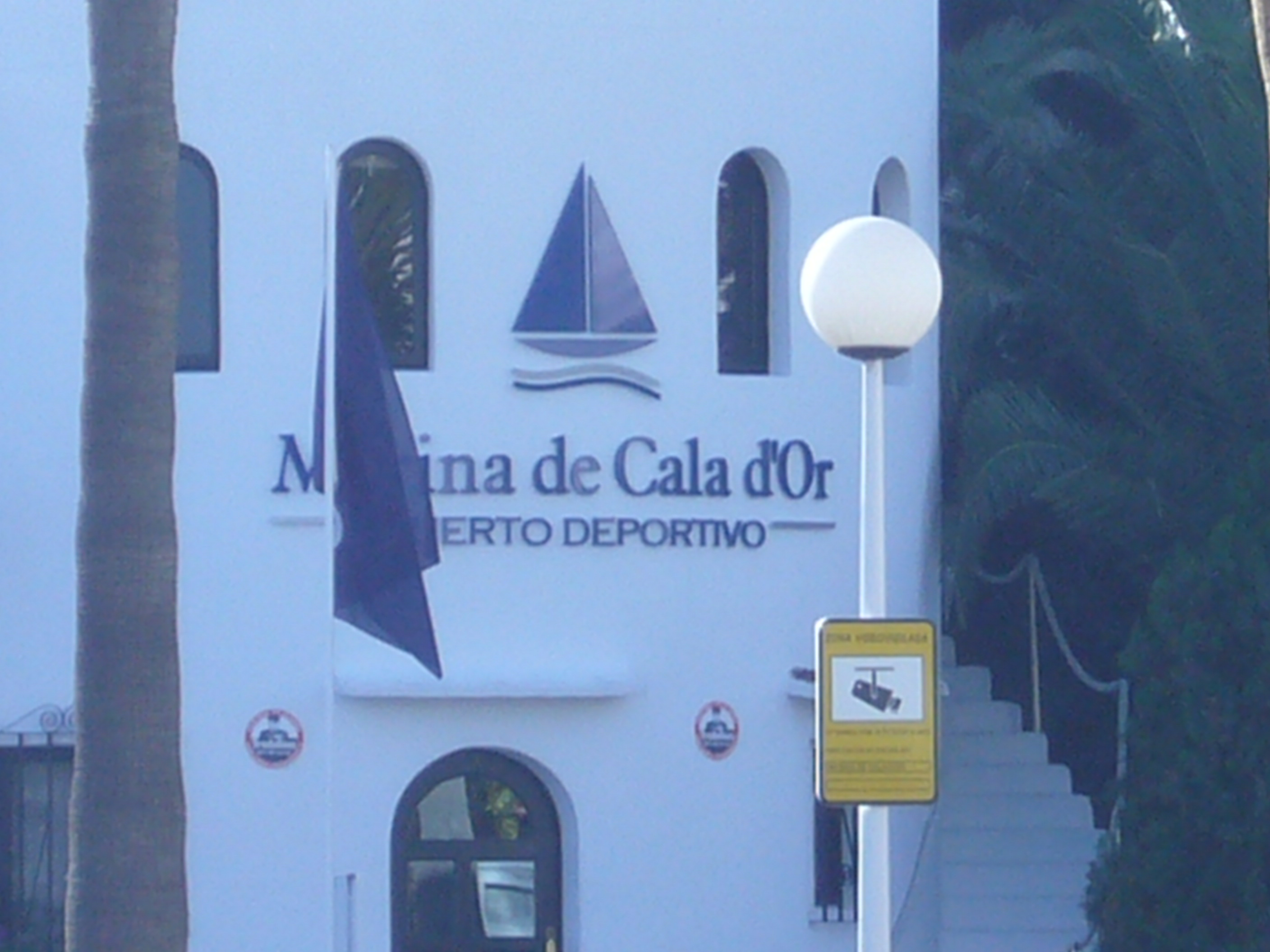 Puerto deportivo de Cala d'Or, en Baleares (España)